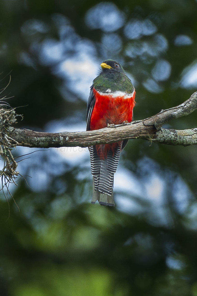 Collared trogon - Mexico_S4E7481